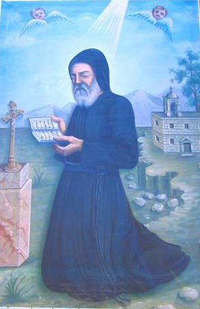 Mar Awtel.jpg